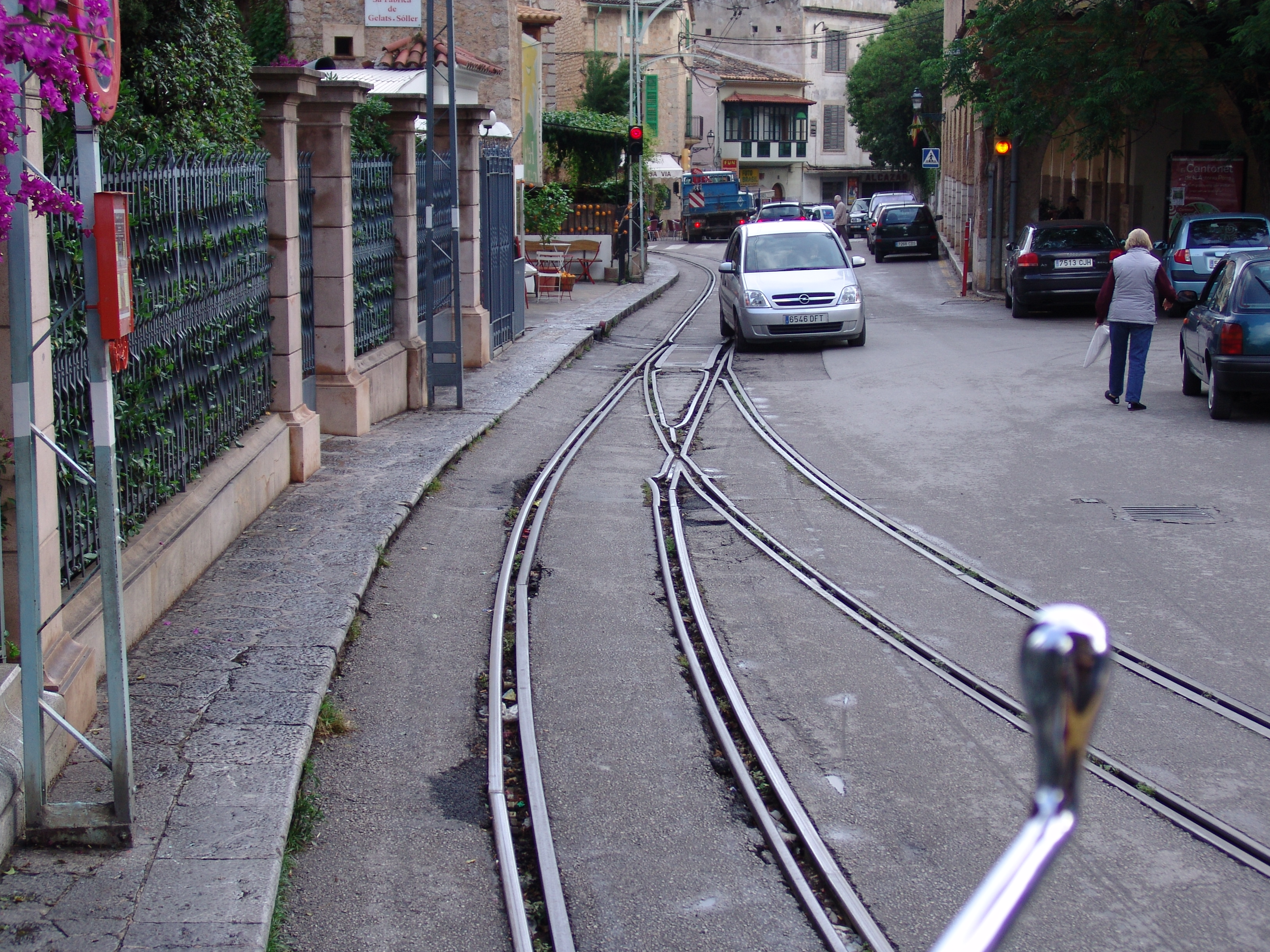 Straßenbahn Haltestelle in Sóller